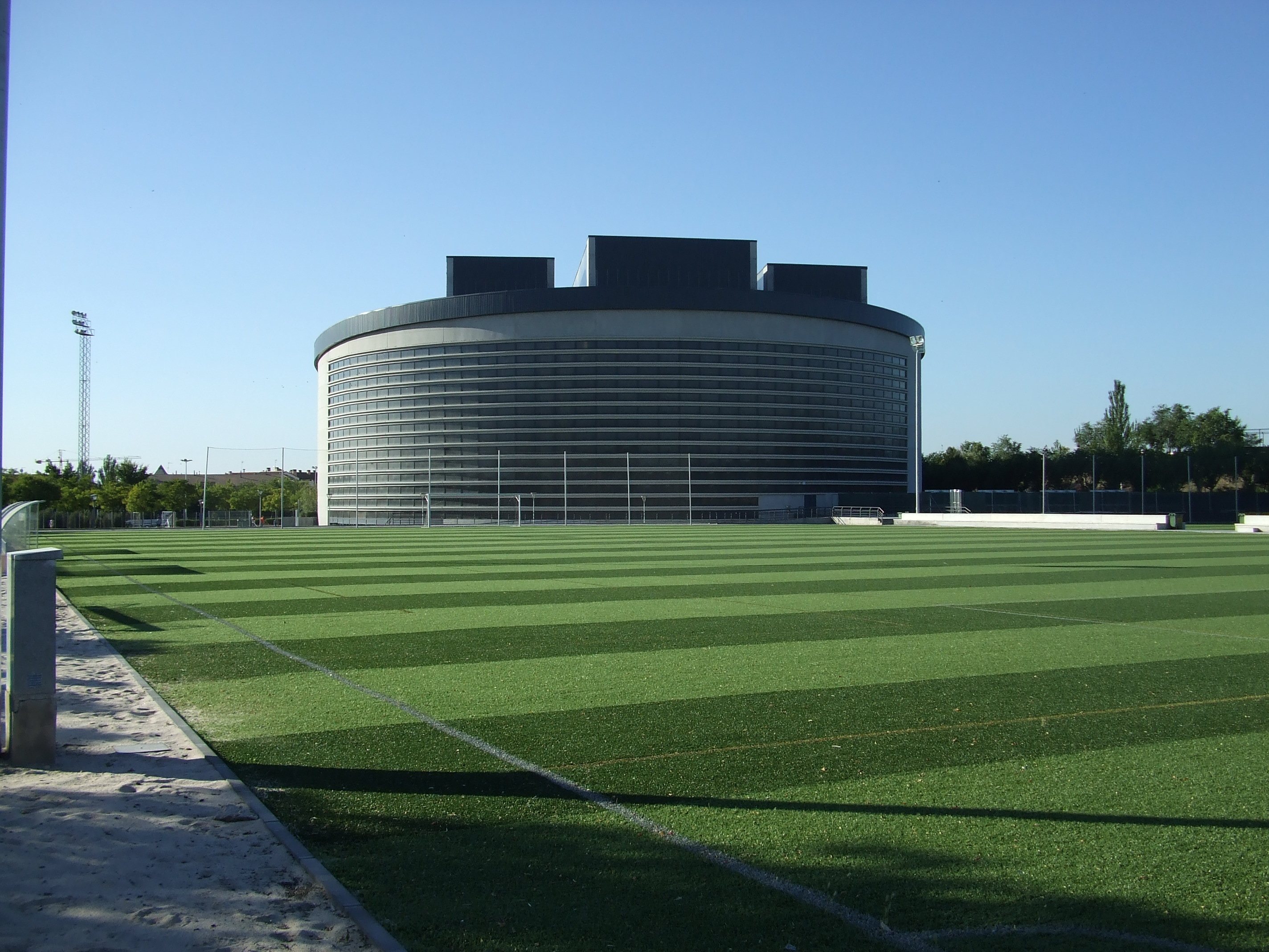 Polideportivo Municipal Principes de Asturias